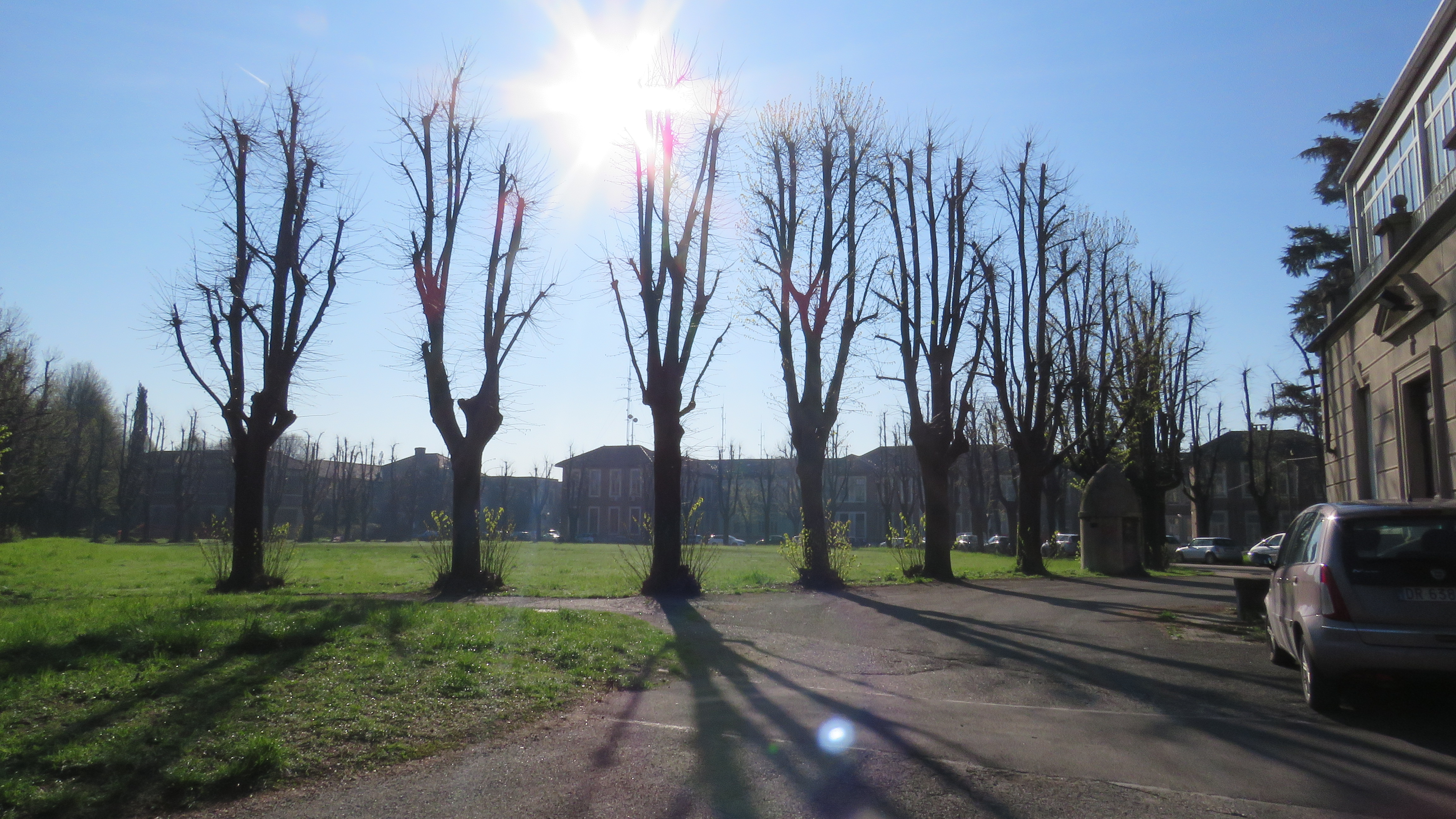 מחנה העקורים בגרוליאסקו